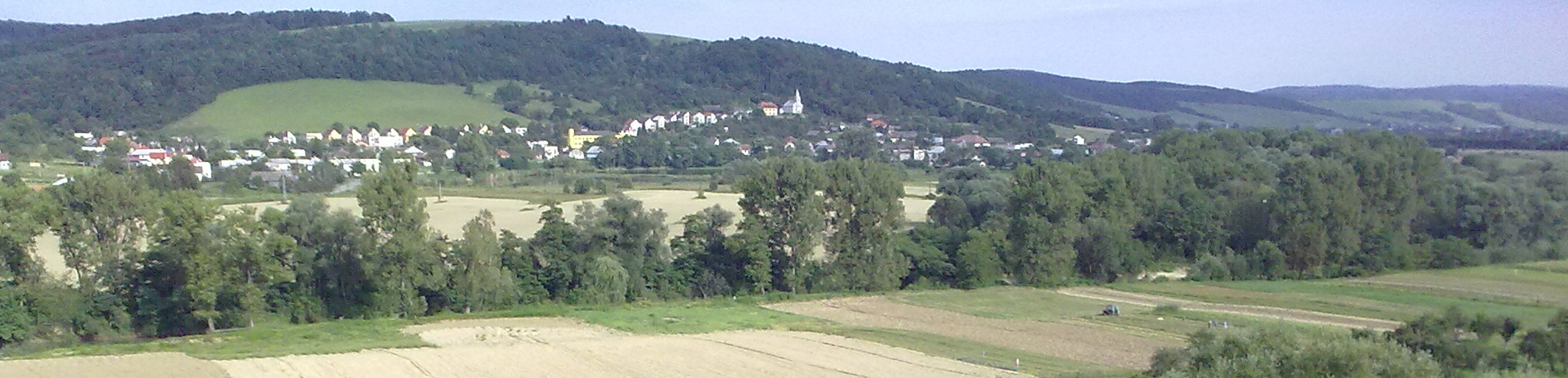 Pohľad na Marhaň zo západu.